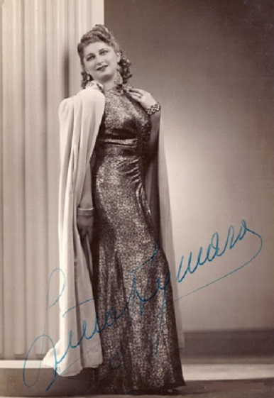 Lina Aimaro in Lucia di Lammermoor